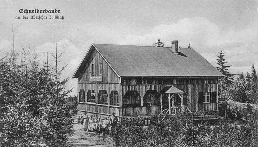 Schneiderbaude bei Glatz, Vorgängerbau der heutigen